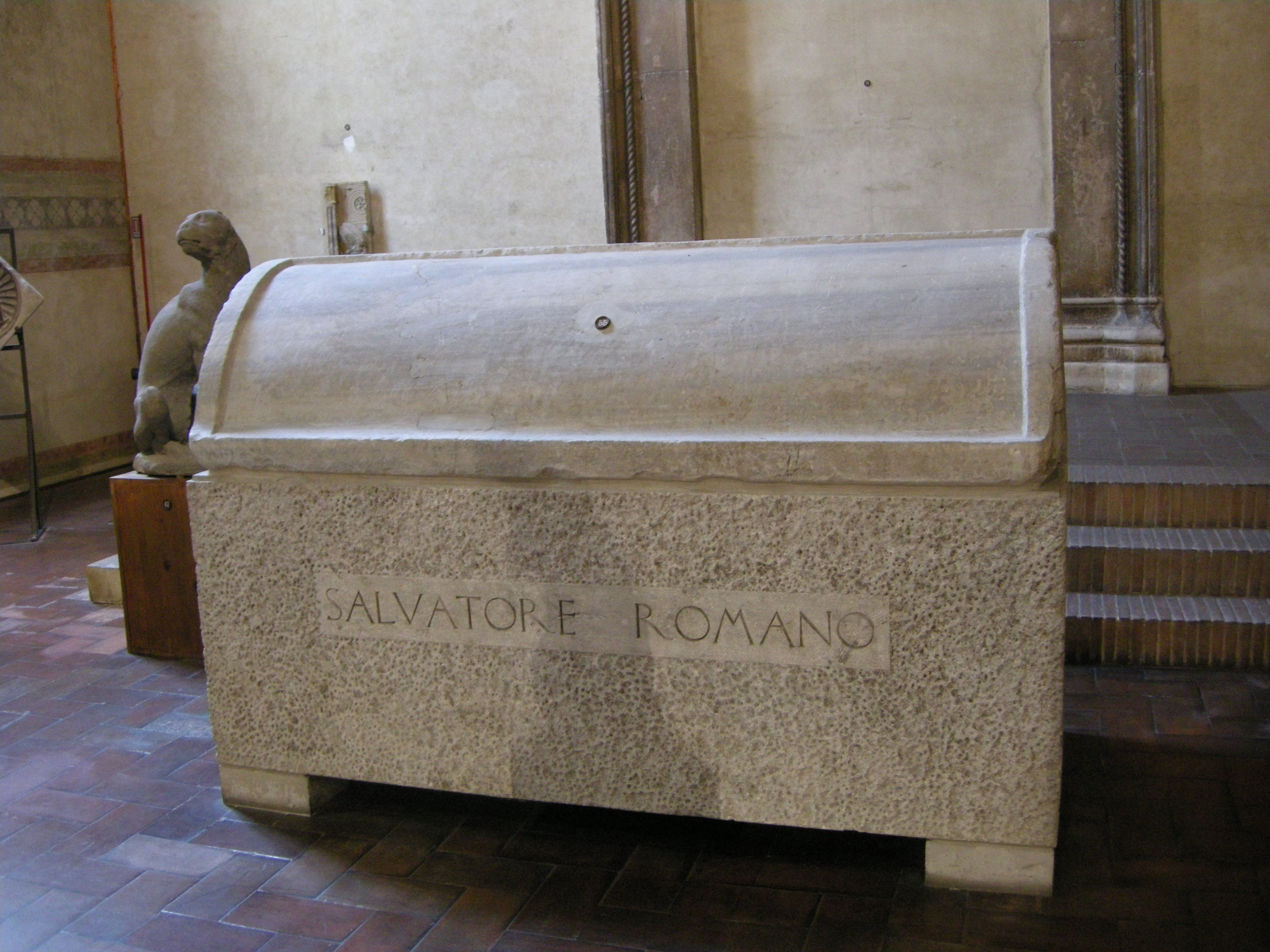 Lapicida ravennate, coperchio di sarcofago con monogramma cristo tra pavoni, VII sec, sepolcro di salòvatore romano